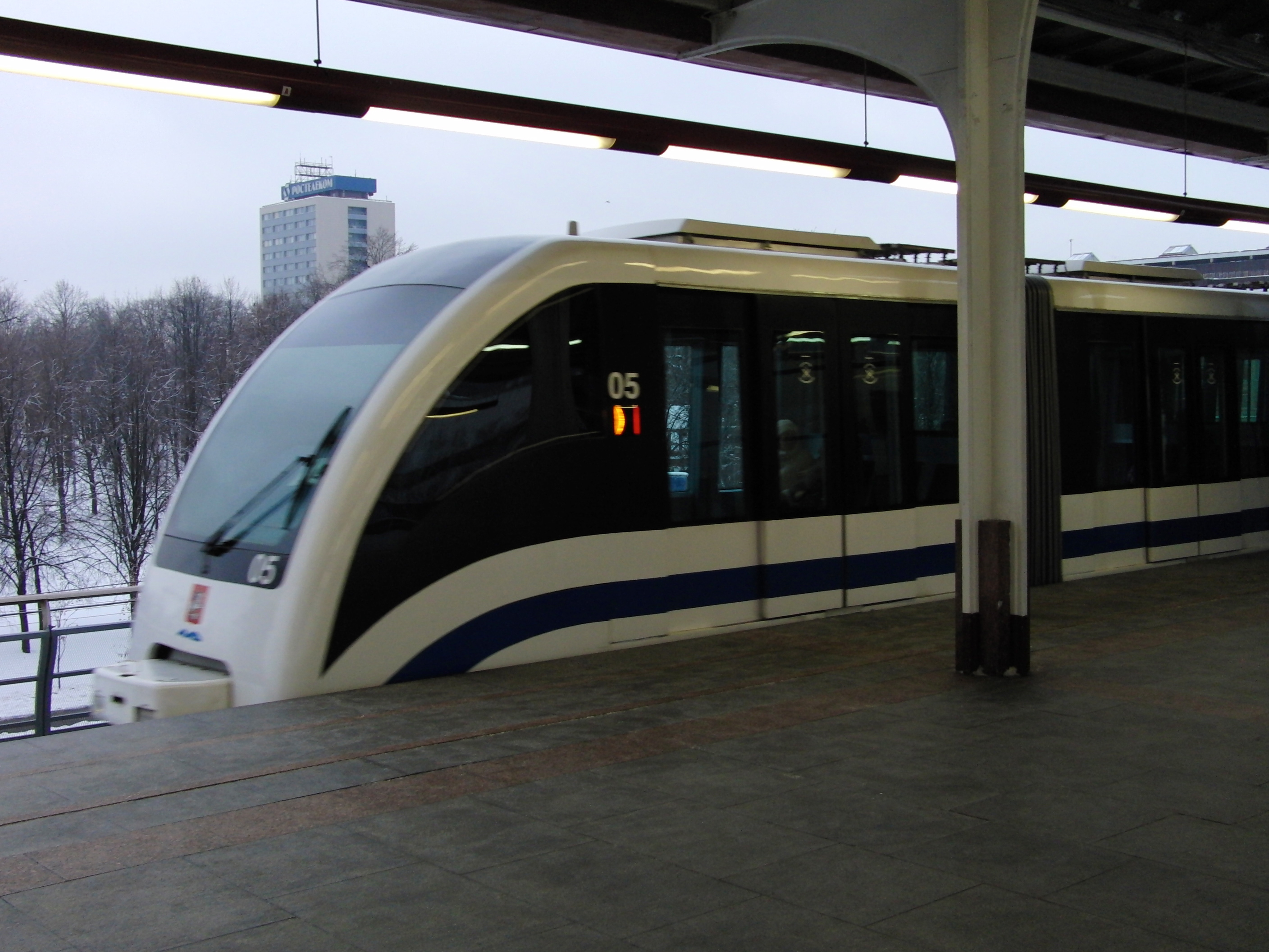 Moscow Monorail, Teletsentr station (Московский монорельс, станция Телецентр)